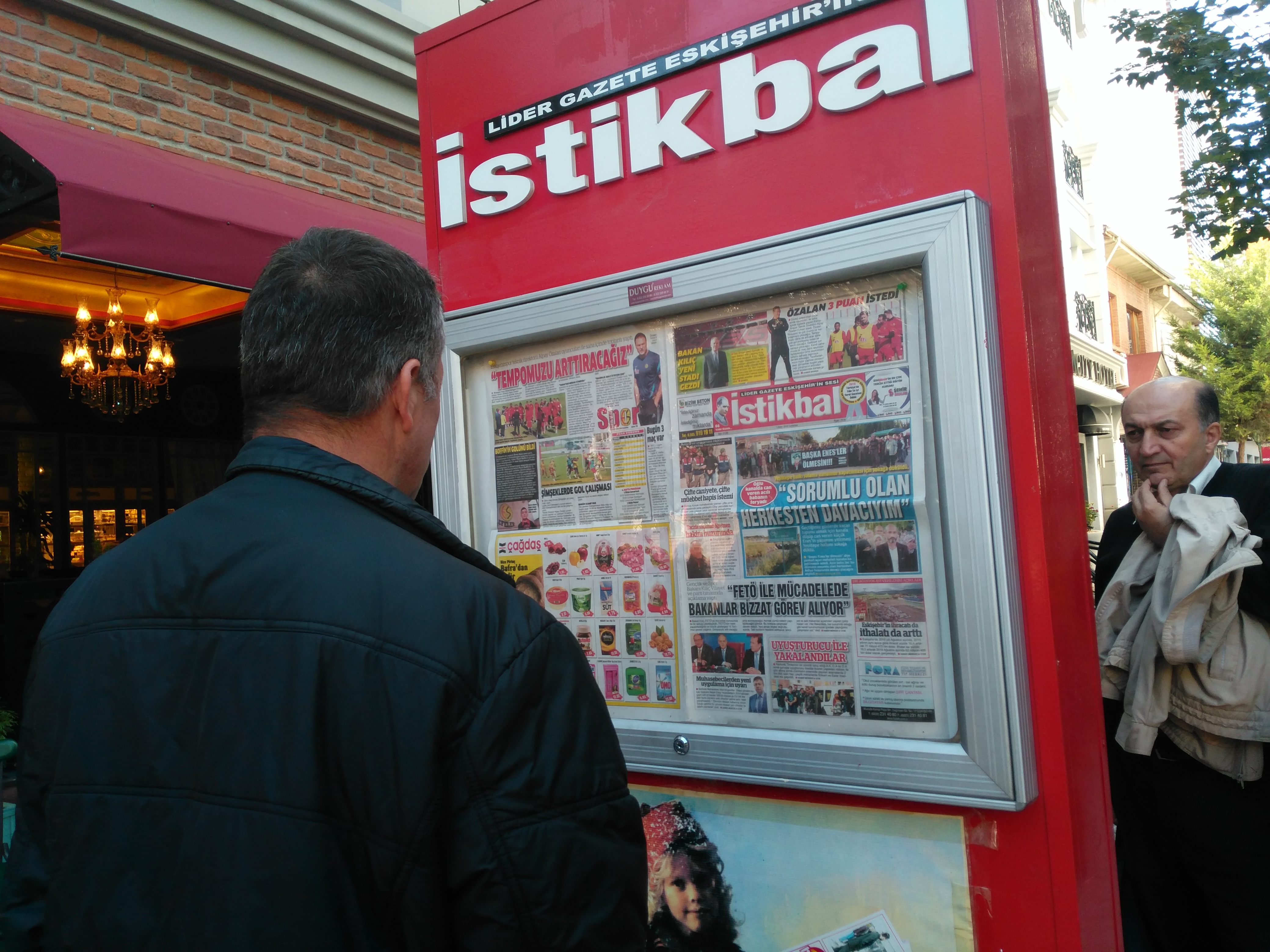 Eskişehir'de İstikbal Gazetesine ait bir ilan panosundan haber okunuyor.